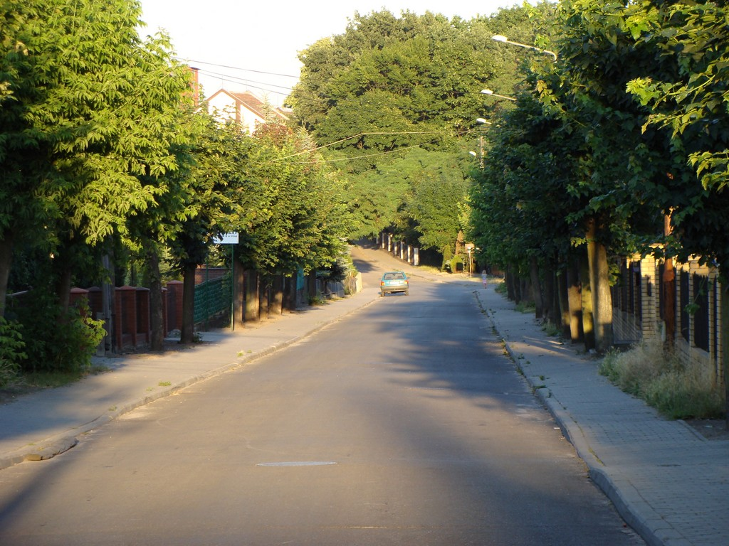 Śrem, Wójtostwo, ul. Wiosny Ludów.